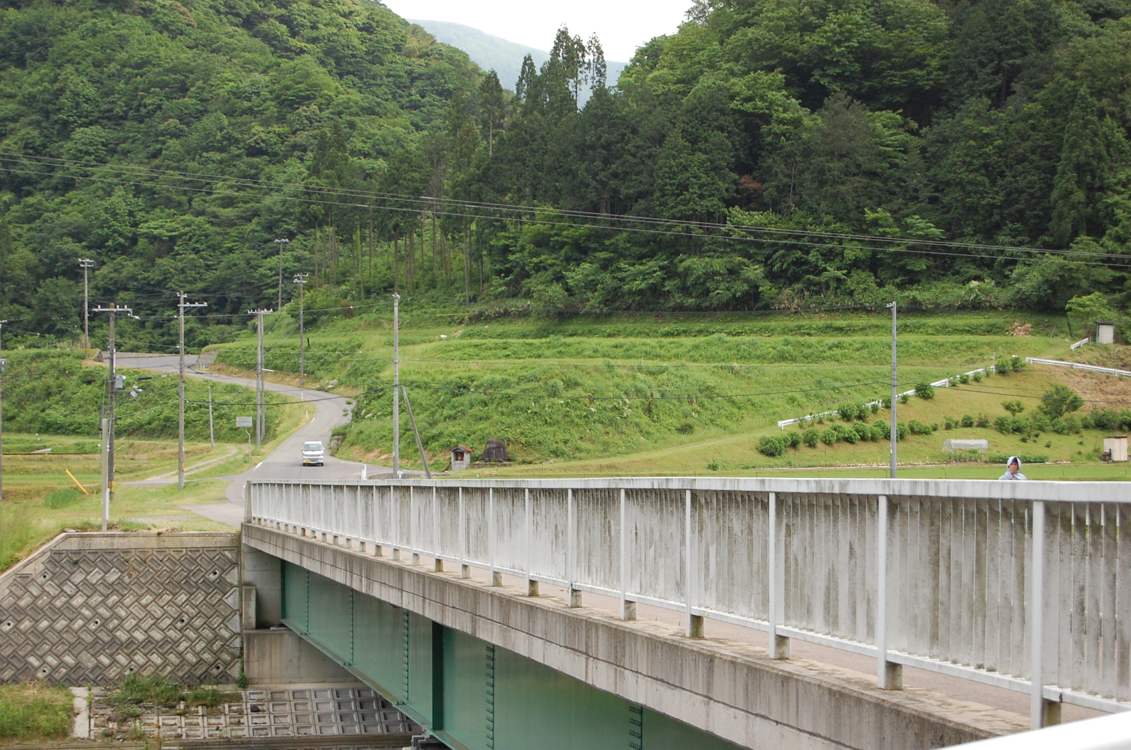 山田橋。県道4号線との接続場所付近。奥は山田。